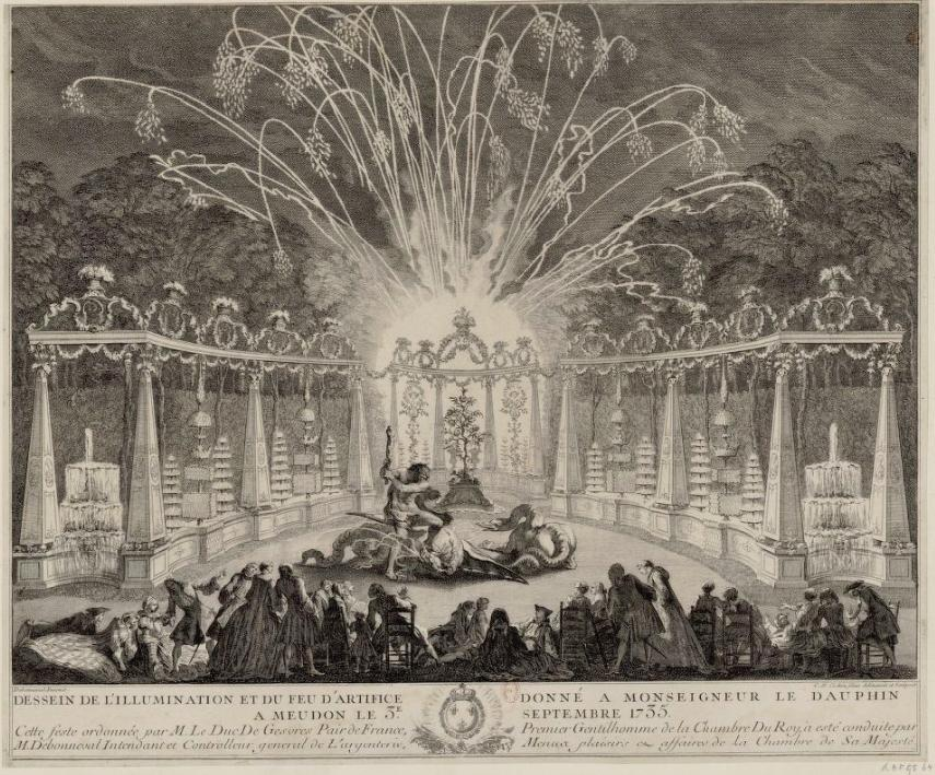 "Dessein de l'illumination et du feu d'artifice donné à monseigneur le Dauphin à Meudon le 3.e septembre 1735". BNF